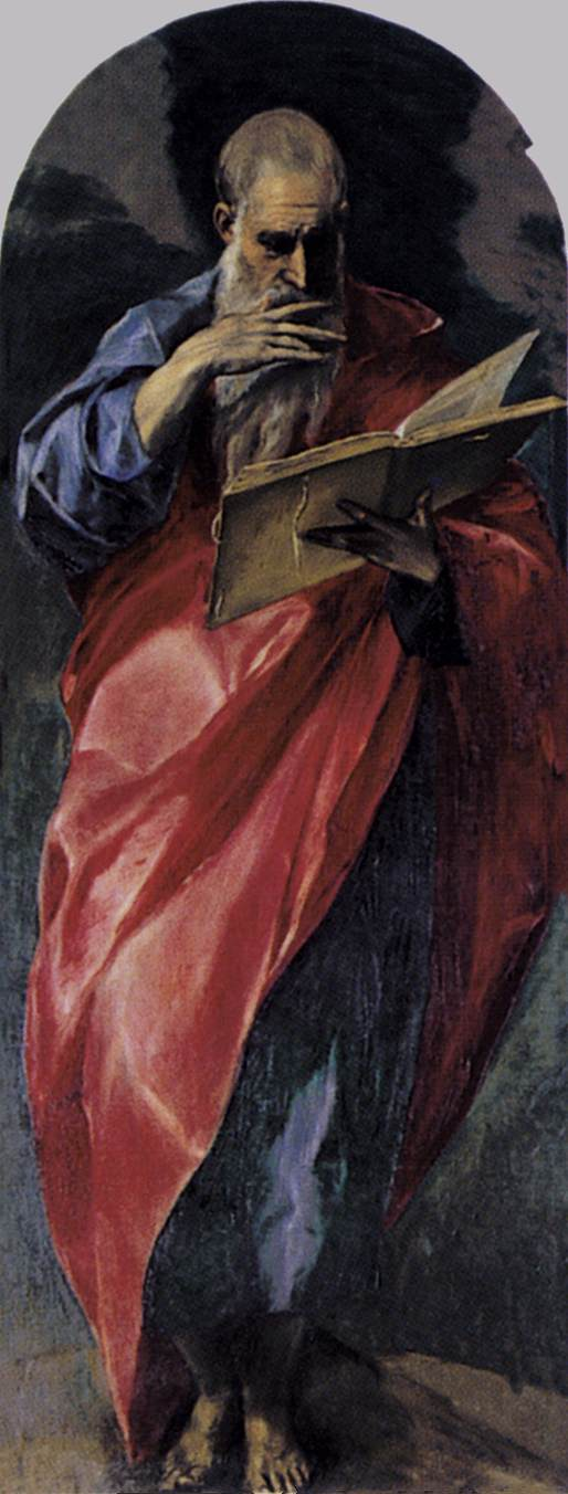 La obra representa a San Juan Evangelista.